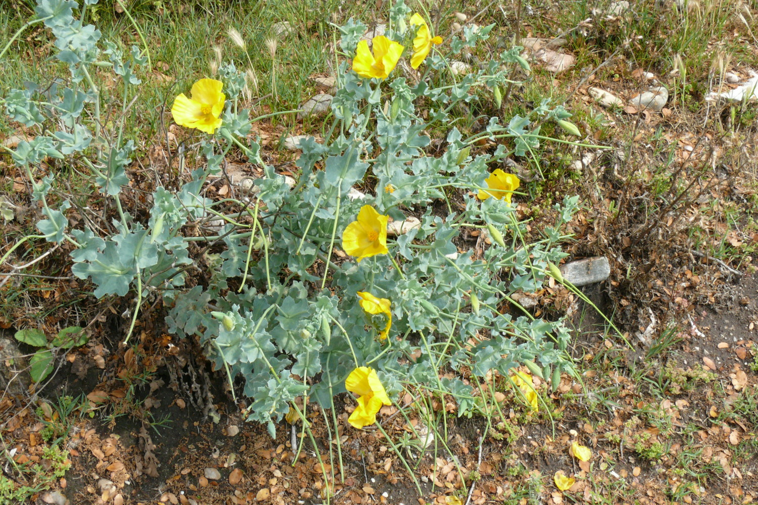 Glaucium flavum, Photo from Thasos